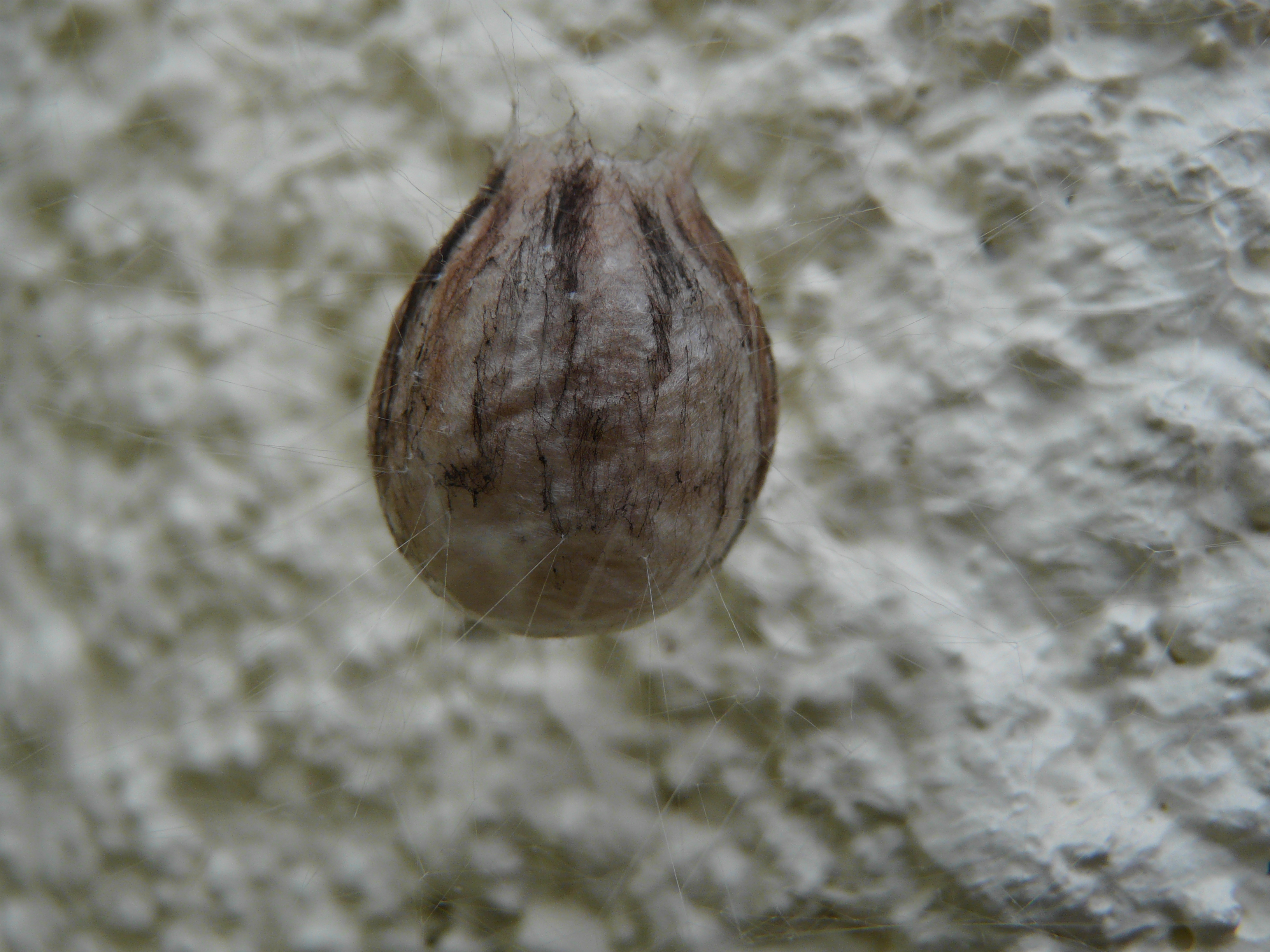 Cocon d'Argiope bruennichi, Périgueux, Dordogne, France.